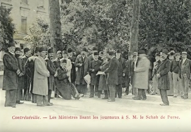 Deuxième voyage de Mozaffaredin shah en Europe (1902). Il est photographié à Contrexéville où il séjourna plusieurs jours. Le shah est le seul personnage assis de la photo. Antoine Kitabgi Khan est le premier personnage tout à fait à gauche sur la photo.